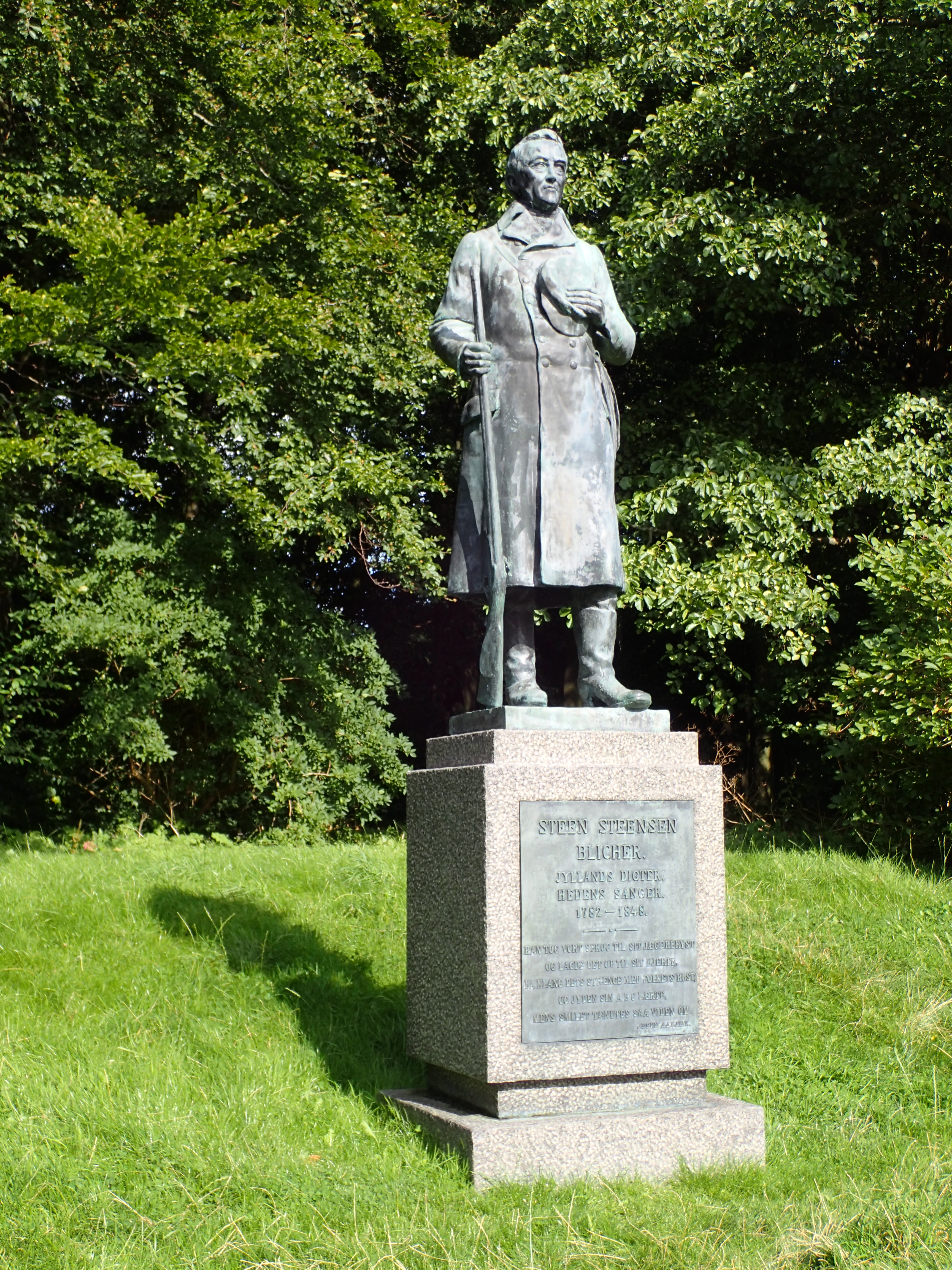 Bronze statue af Steen Steensen Blicher i Botanisk Have i Aarhus.